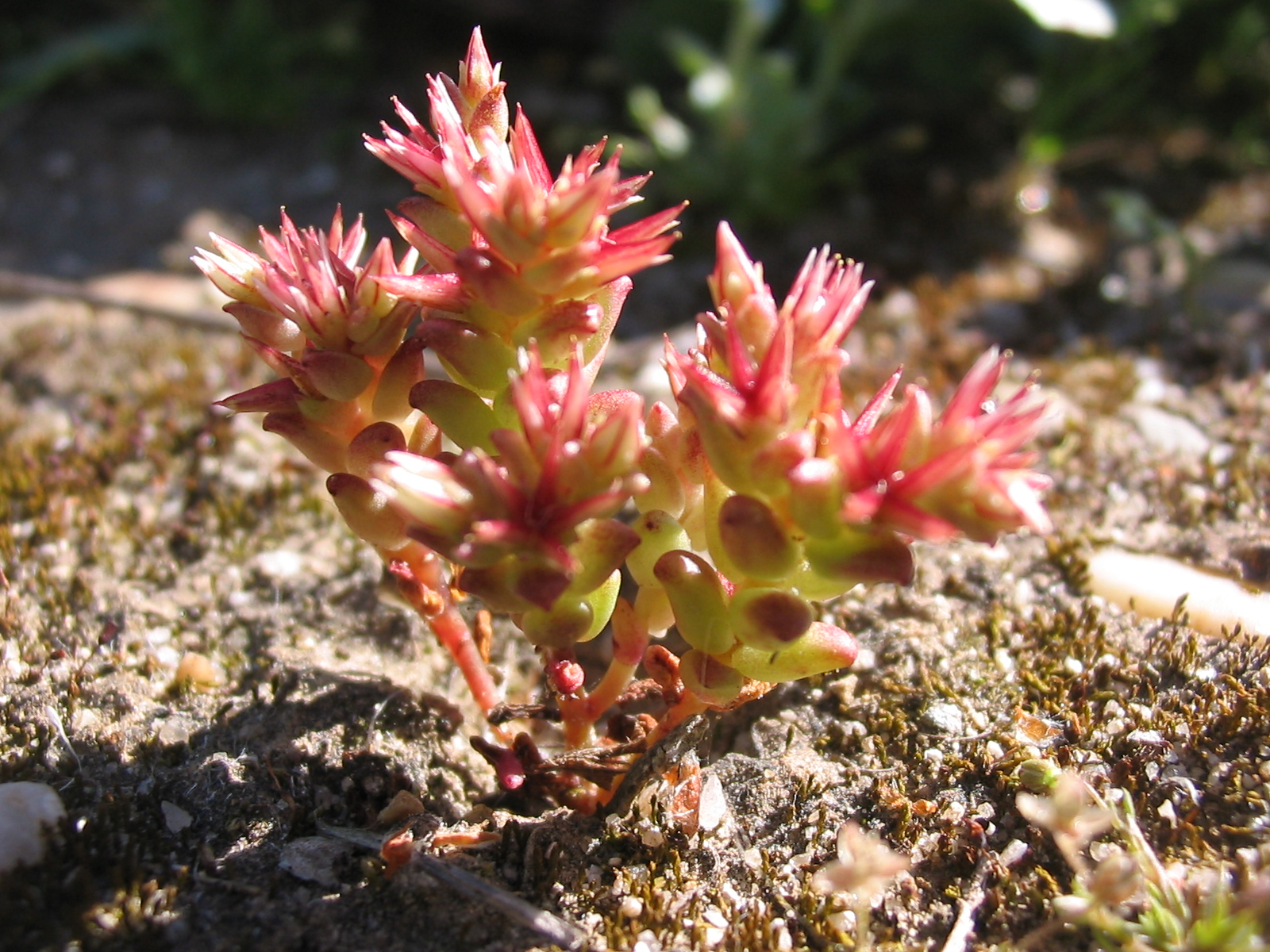 Pablo Alberto Salguero Quiles. Madrid. España. Ejemplar de 5 cm de altura